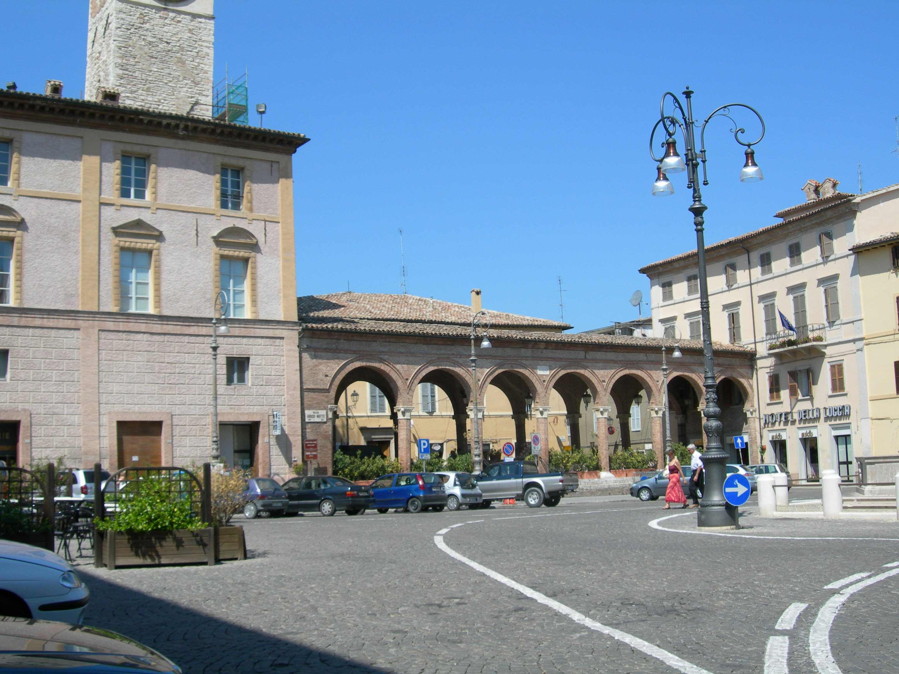 Scorcio della piazza Enrico Mattei, Matelica, la loggia